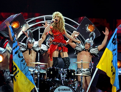 Светлана Лобода на конкурсе «Евровидение-2009»